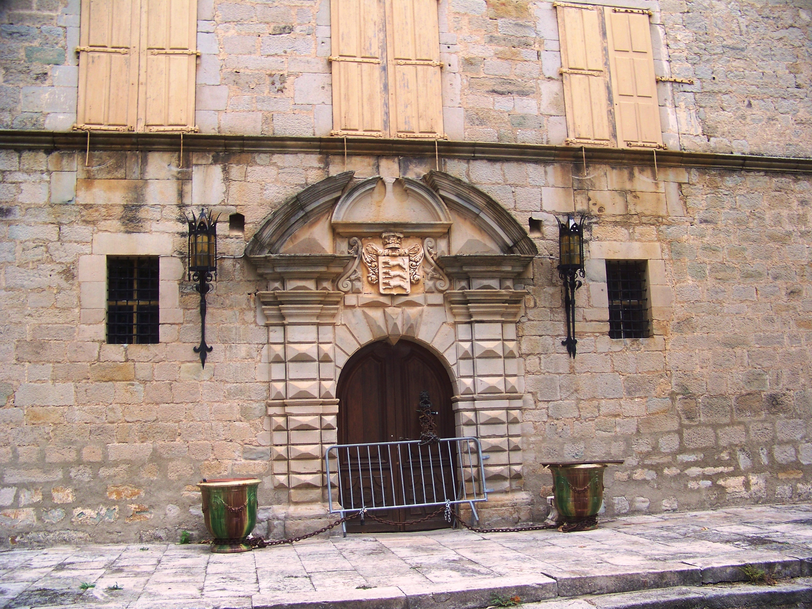 Porte à bossage aux armes de la famille de Chanaleilles .